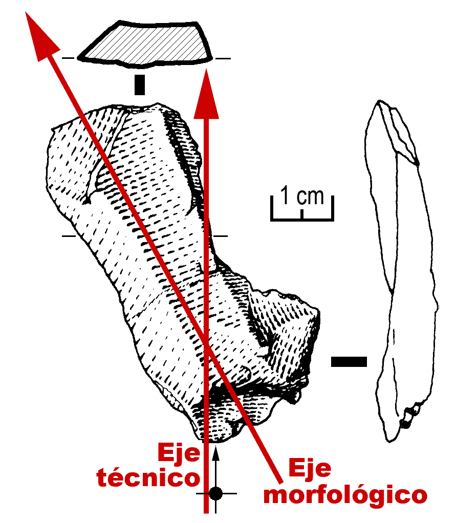 Ejes técnico y morfológico en una lasca de ejemplo del yacimiento achelense de El Basalito (Salamanca, España)